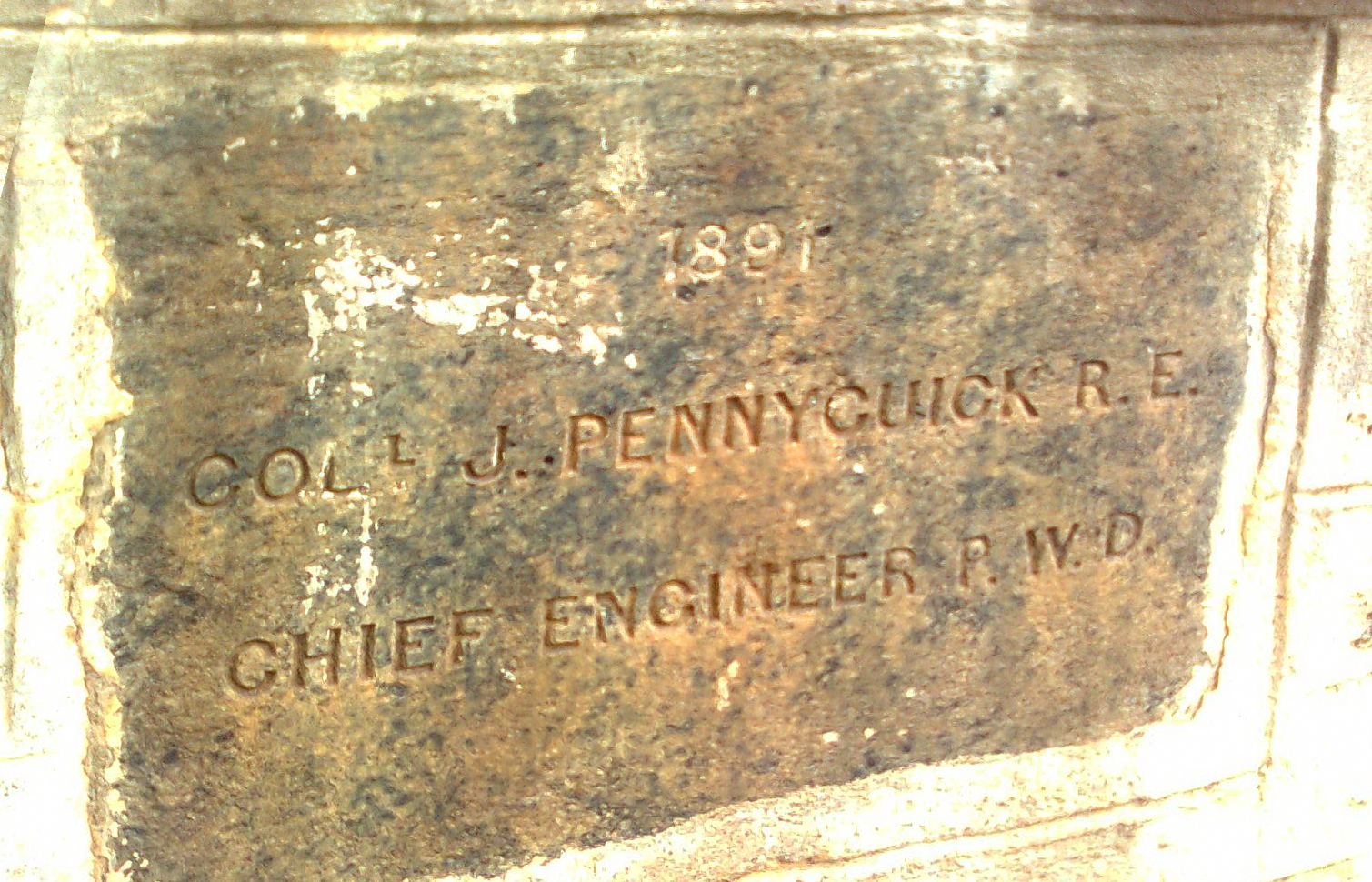 கர்னல் ஜே பென்னி குக் பெயரில் பொறிக்கப்பட்டுள்ள கல்வெட்டு. இடம்: மதுரை மாவட்டம் வாடிப்பட்டி அருகே - முல்லைப் பெரியாறு பிரதான கால்வாய்.